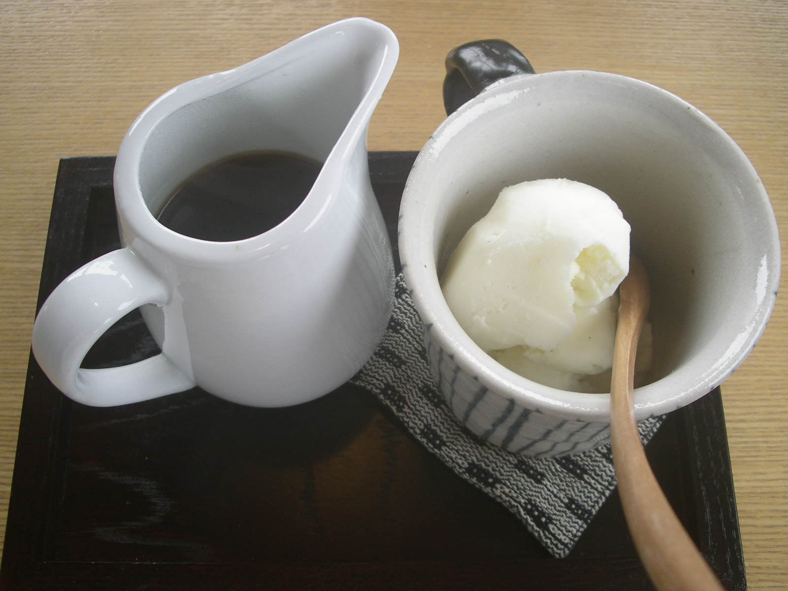 一般的なアフォガート